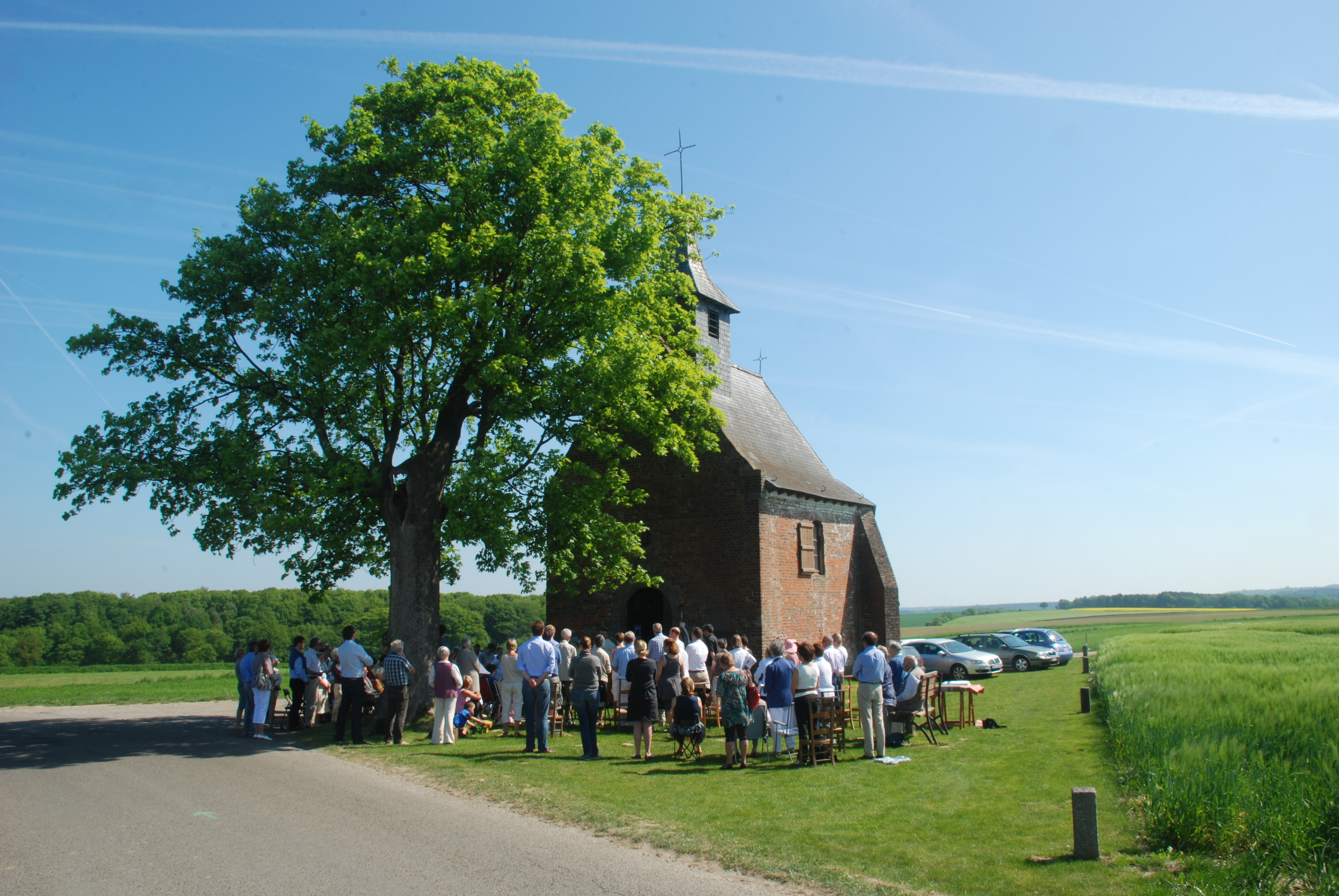 Belgique - Bousval - Chapelle du Try-au-Chêne - messe en plein air.JPG